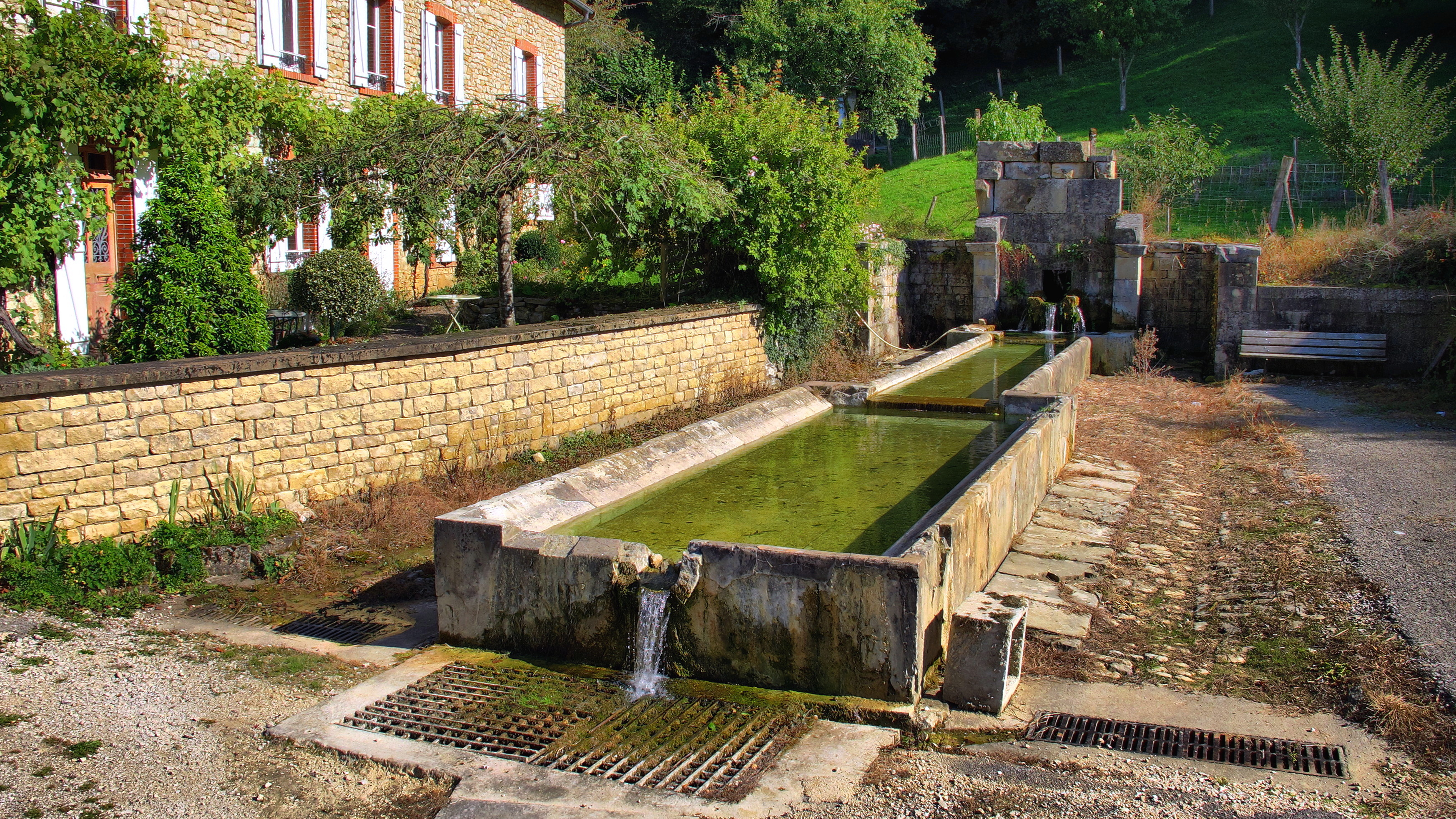 La fontaine-lavoir-abreuvoir